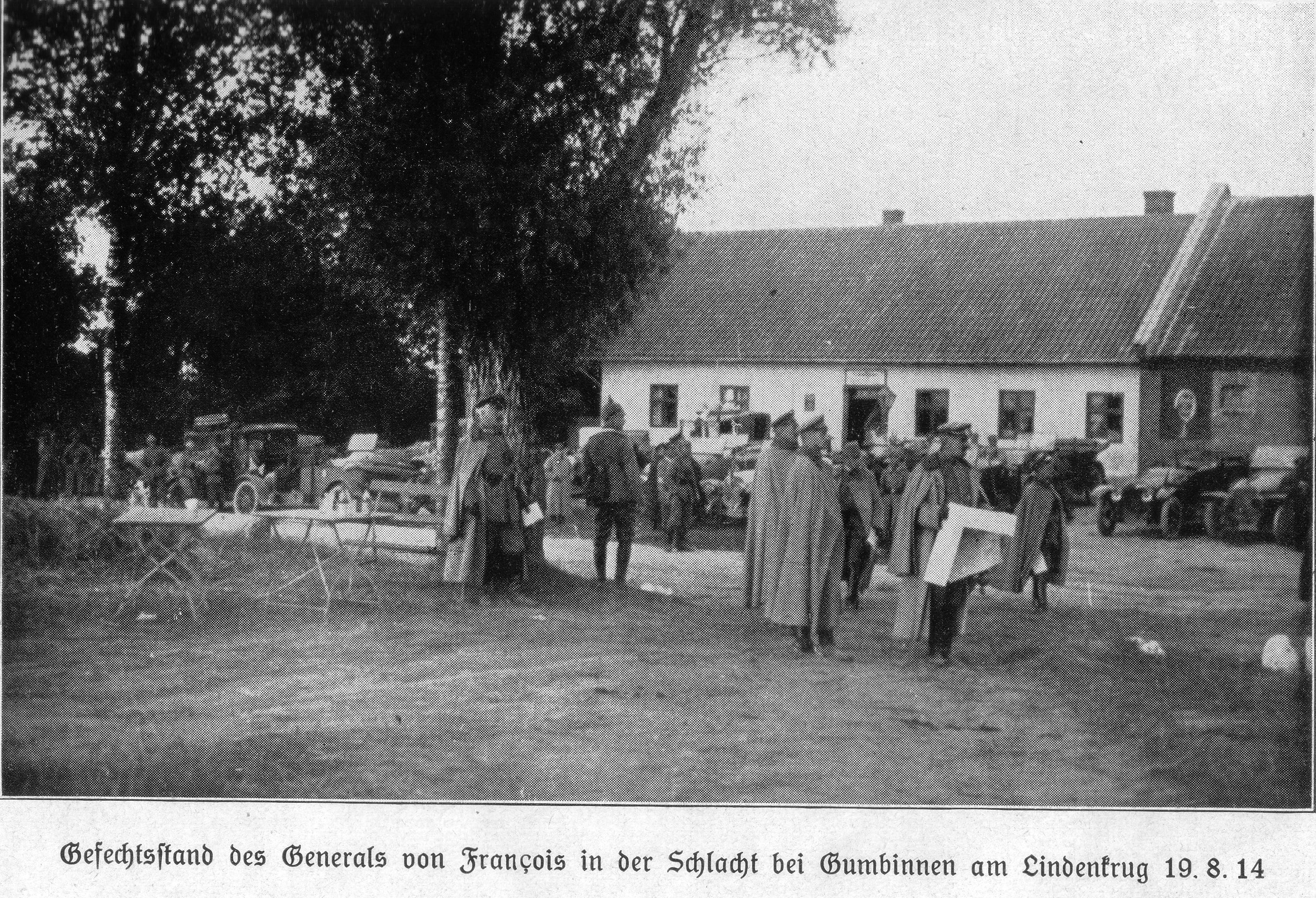 Schlacht von Gumbinnen